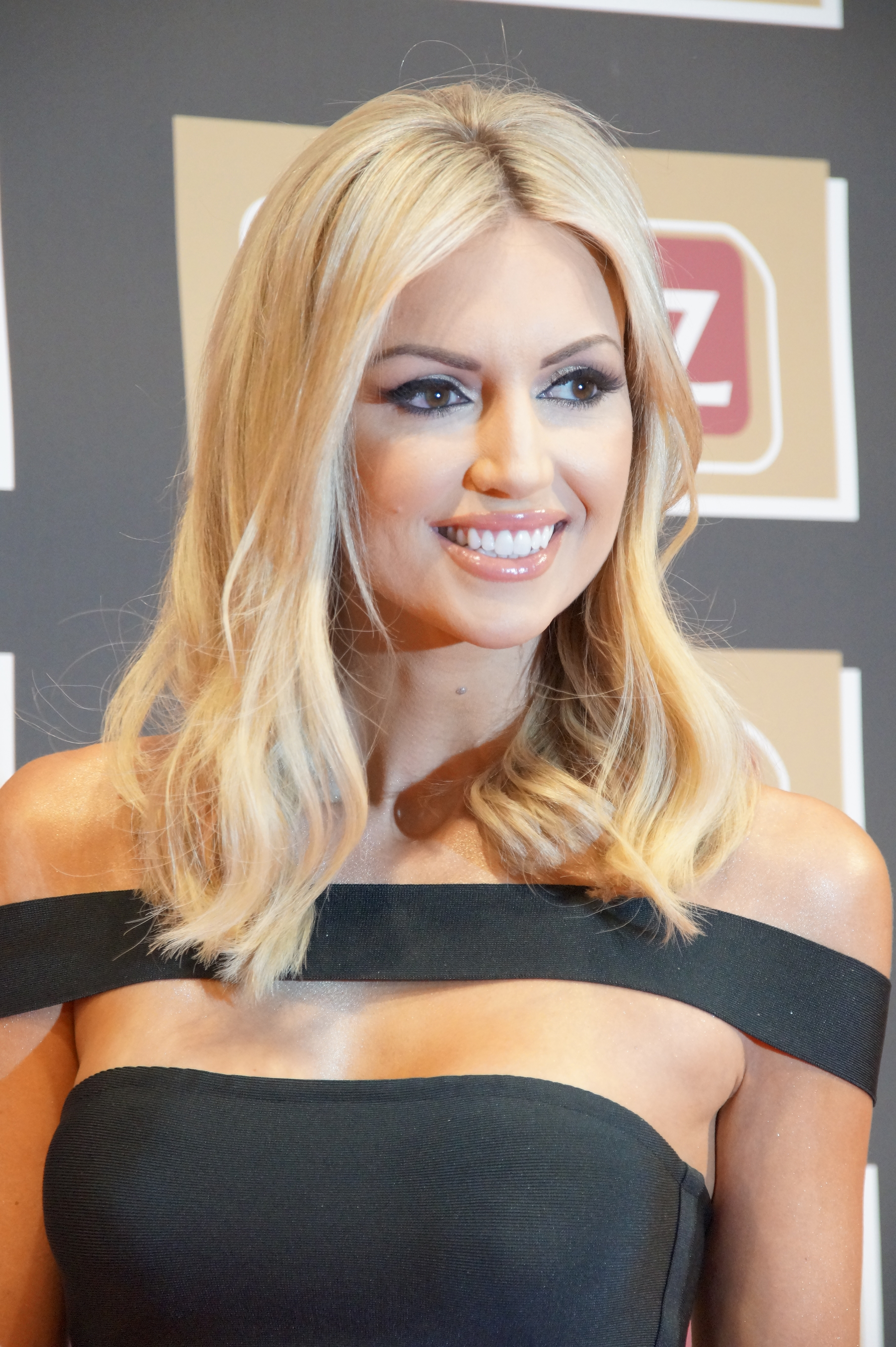 Rosanna Davison bei der Lambertz Monday Night, im Februar 2016.